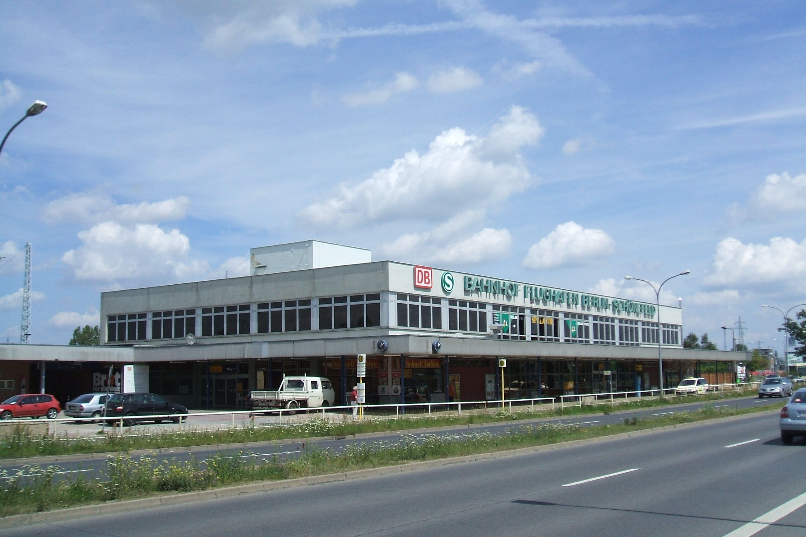 Bahnhof Berlin-Schönefeld Flughafen, das Gebäude von der Straße aus